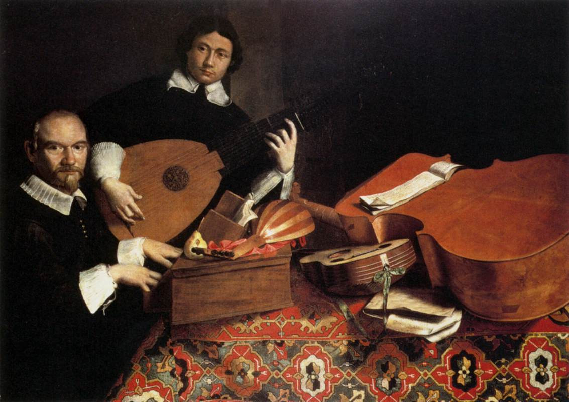 left